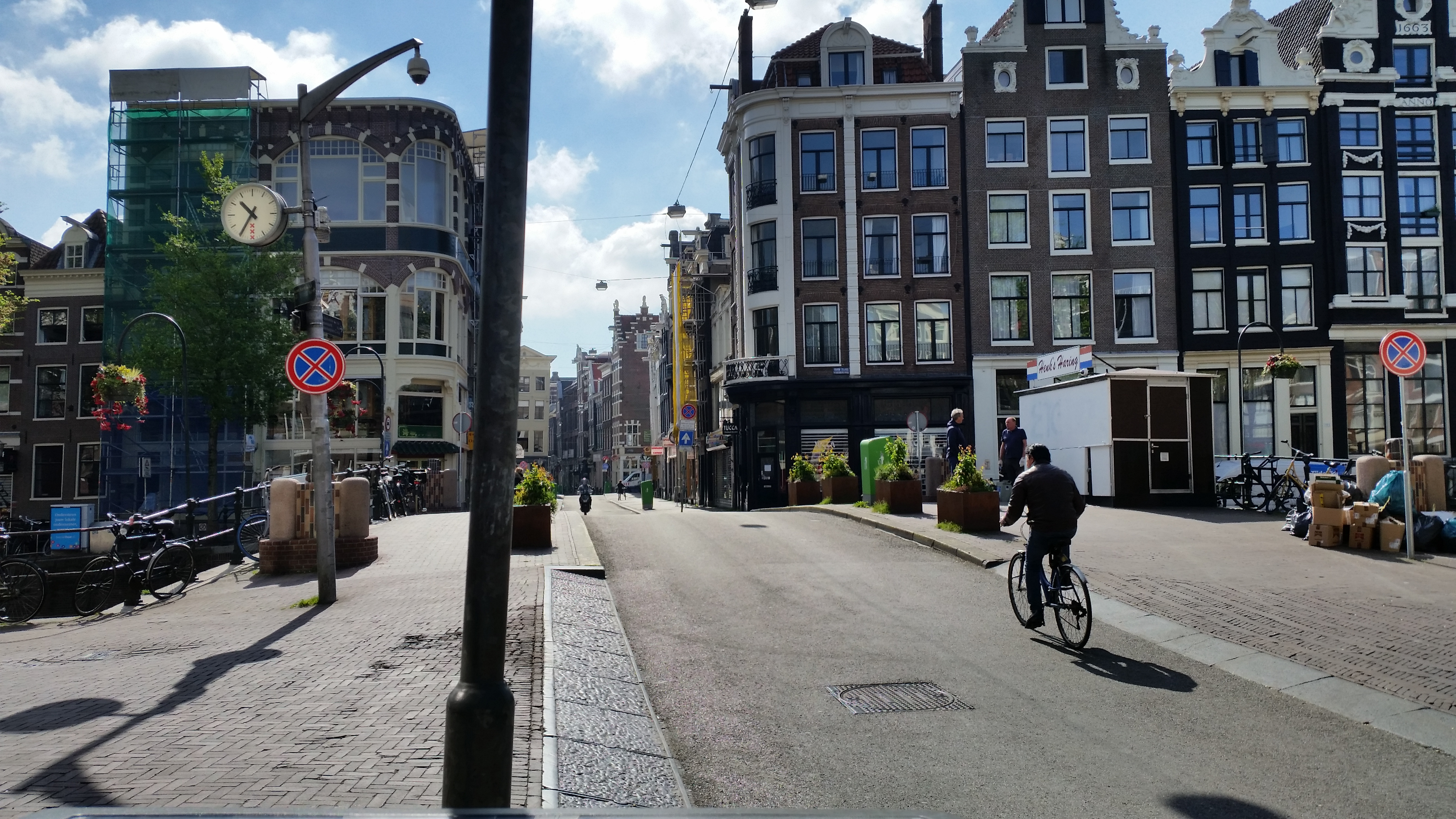 Impressie van de Varkenssluis (brug 204), Amsterdam-Centrum over de Oudezijds Voorburgwal